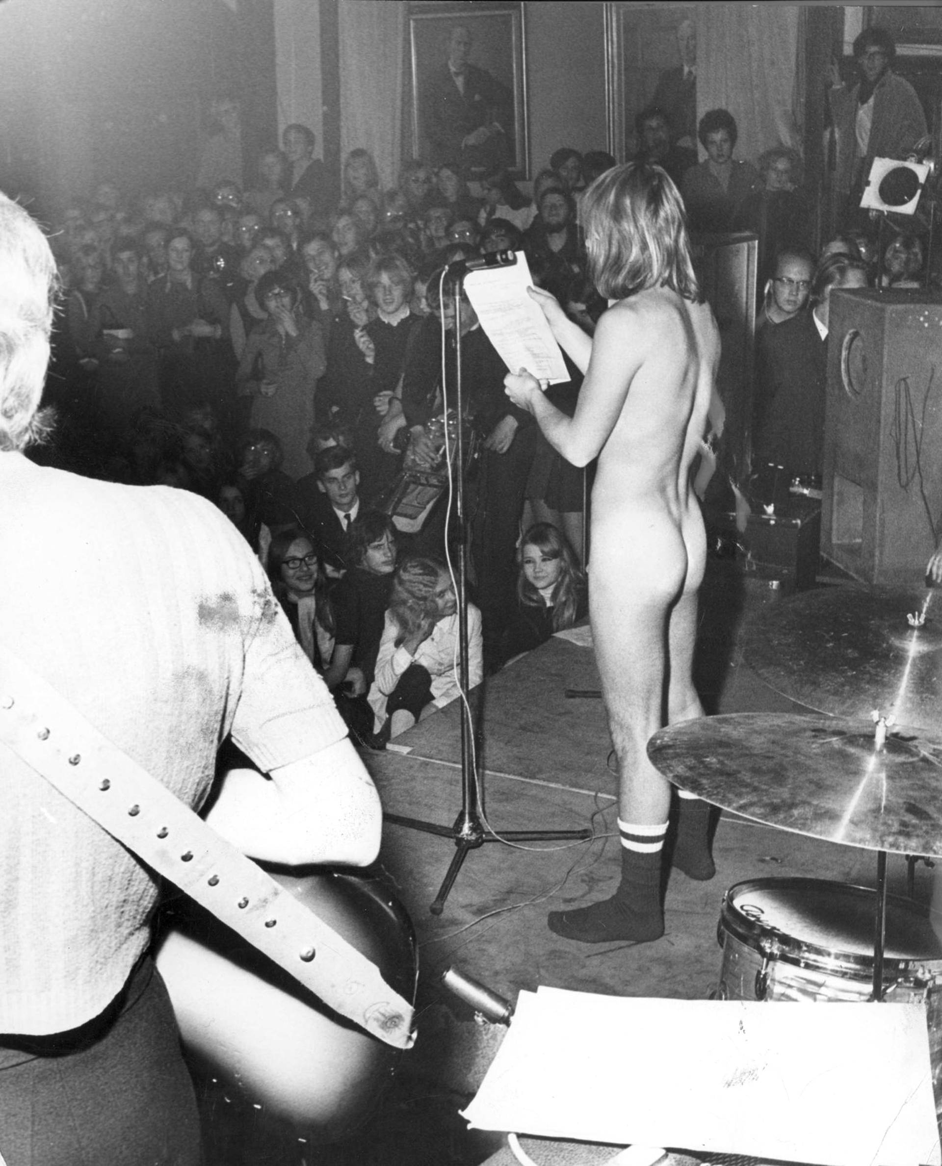 Sperm-yhtyeen Mattijuhani Koponen lukee omaa runoaan YK:n juhlapäivänä torstaina 24. lokakuuta 1968 Natsalla